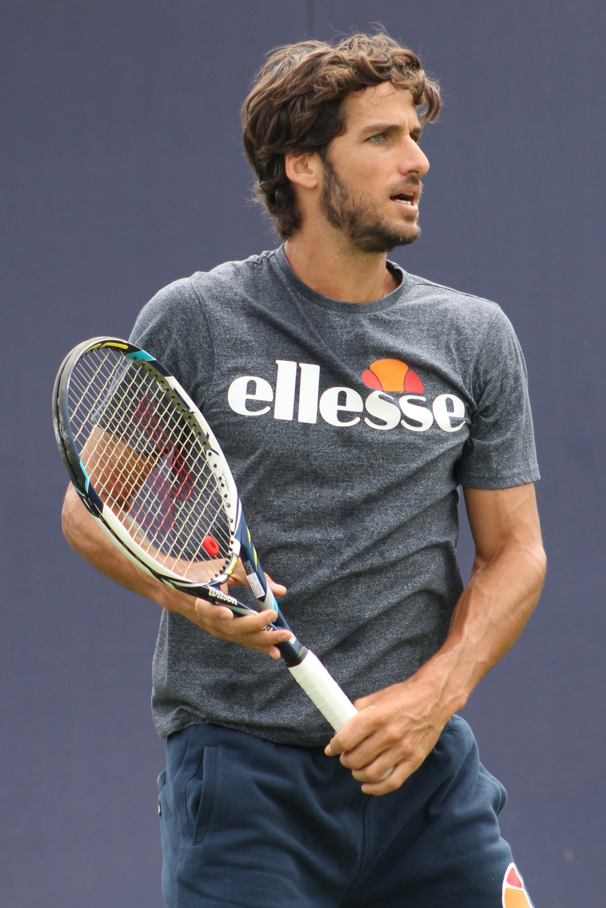 Lopez F. QC15 (1)